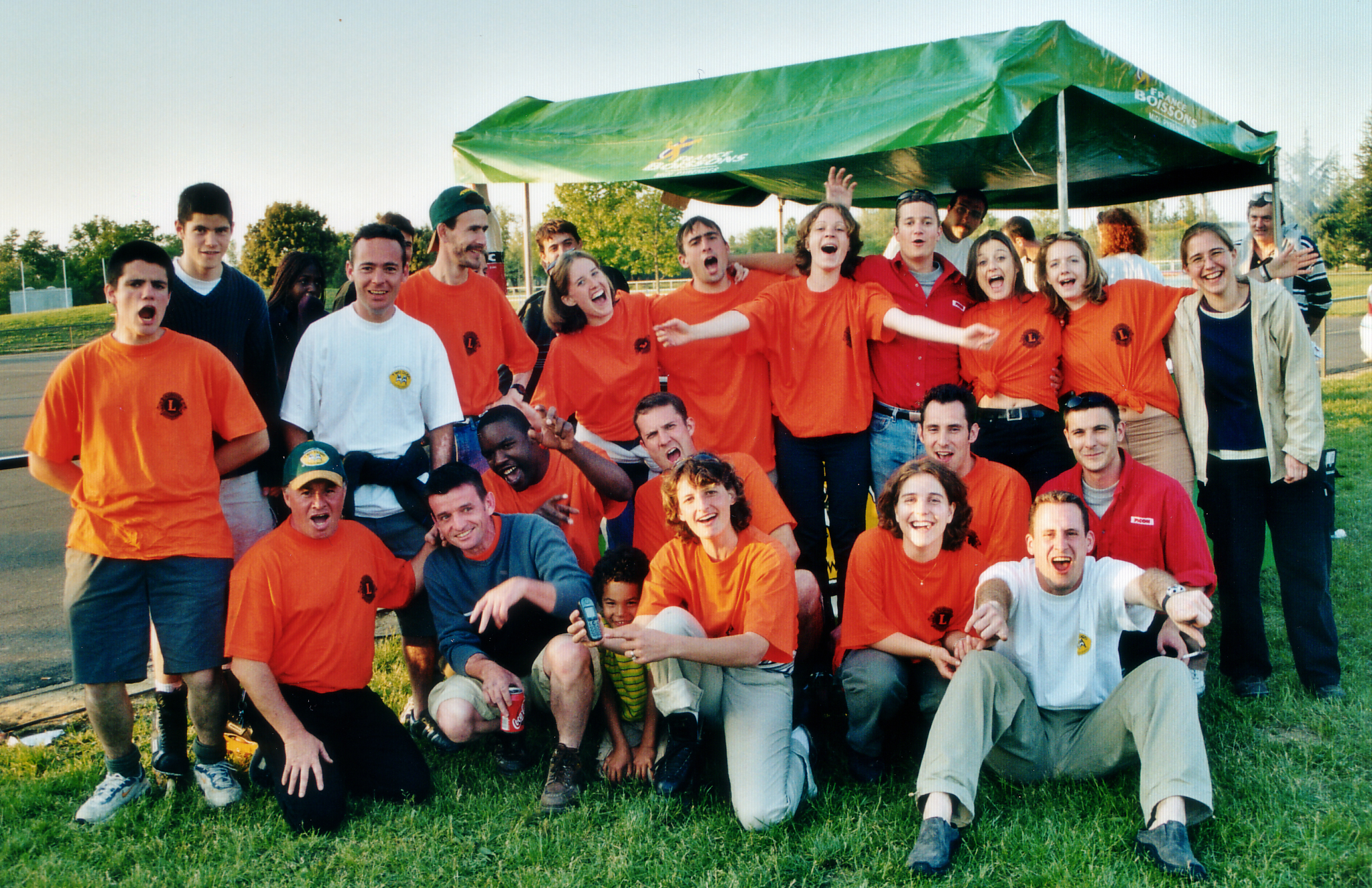 Bureau et membres actifs de Roule Rose en 2002.